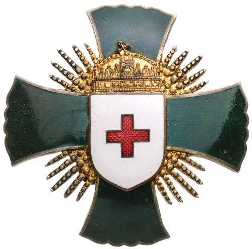 Magyar Vöröskereszt Érdemkeresztje